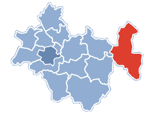 Położenie gminy Przedbórz na terenie powiatu radomszczańskiego.